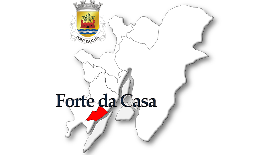 Evolução da População